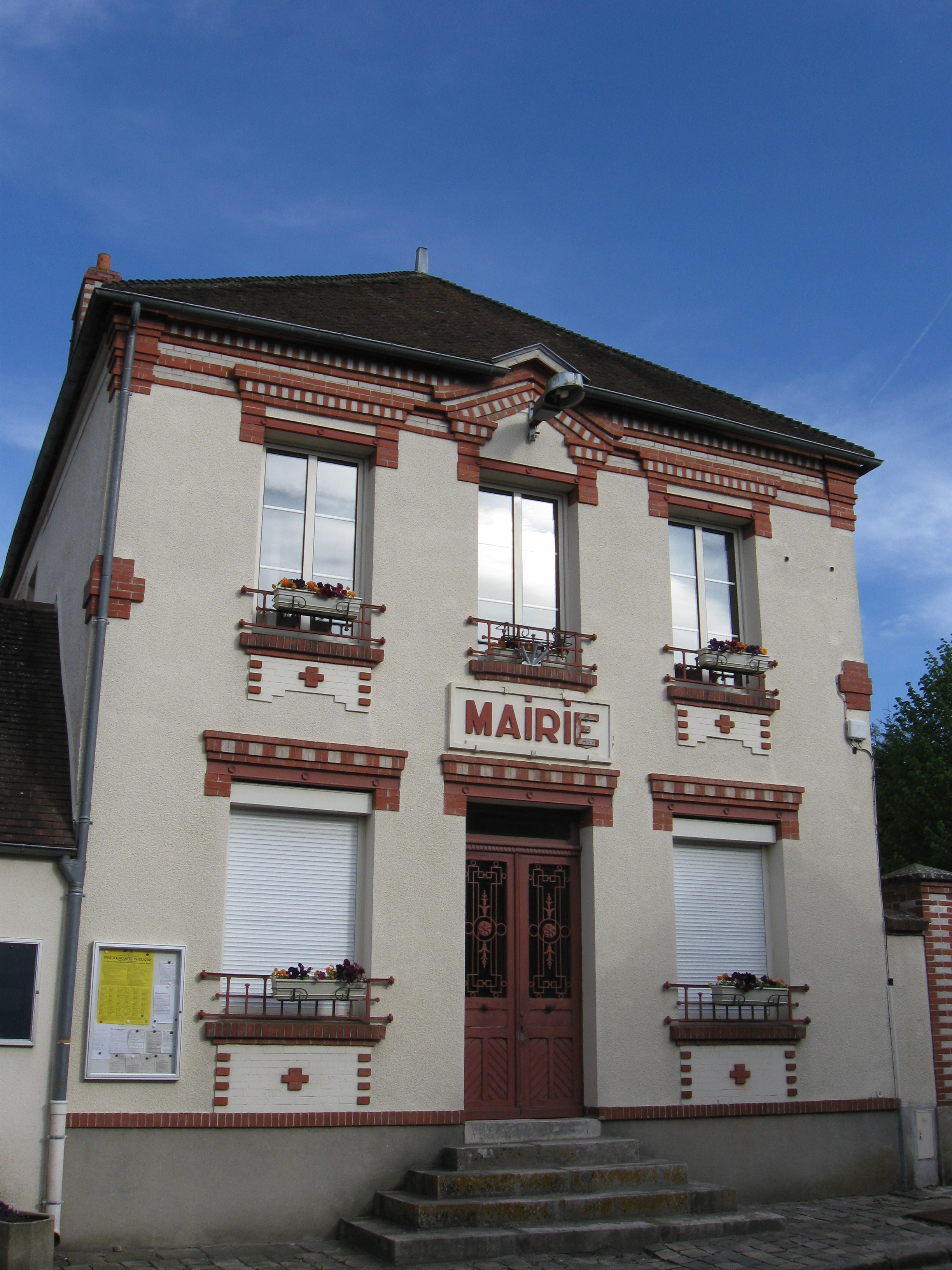 Mairie de Villiers-sous-Grez. (département de la Seine et Marne, région Île-de-France).